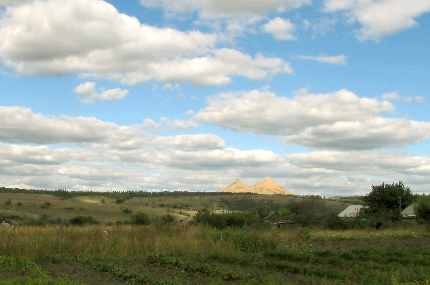 Luganskaya oblast